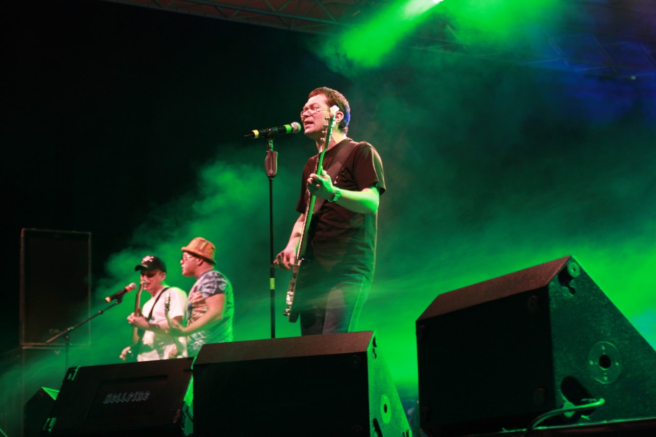 Germany Tour 2012